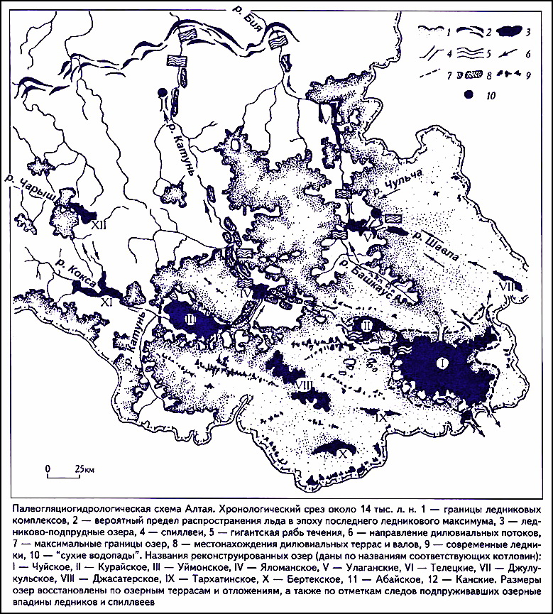 Палеогляциогидрологическая схема Алтая. Автор А.Н. Рудой. Опубликована во многих его работах, в том числе и за рубежом.